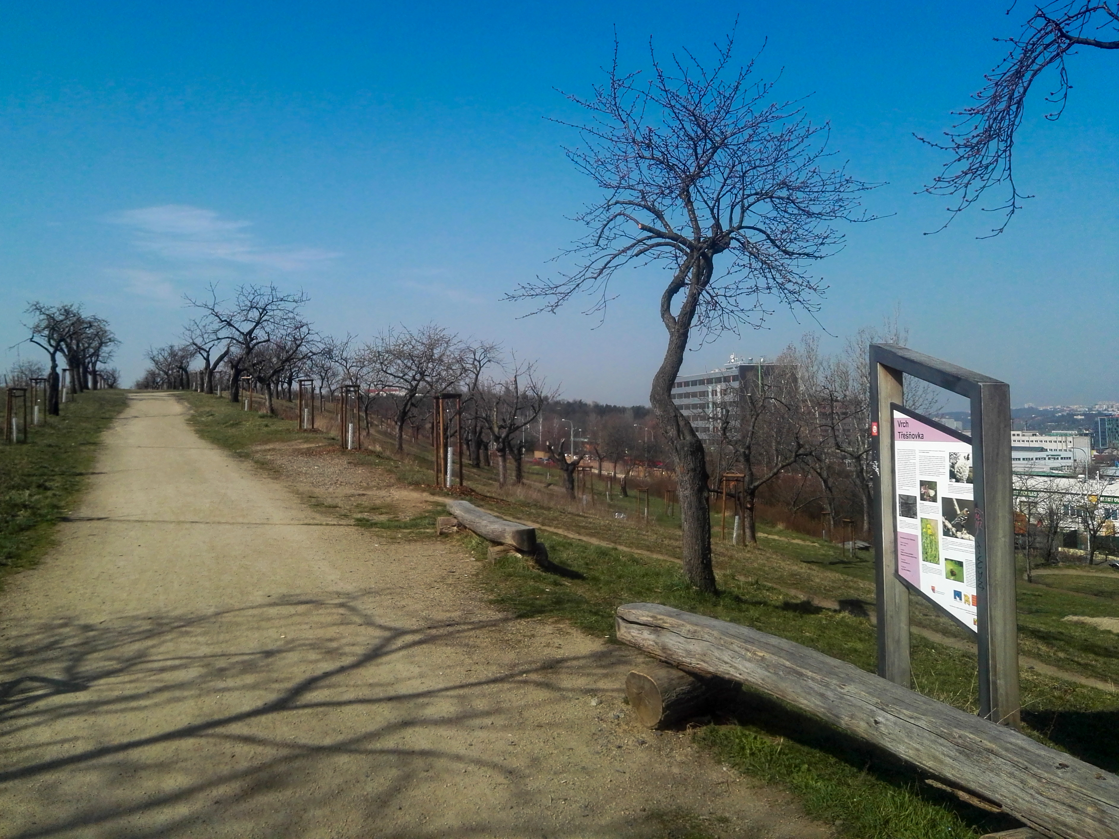 Vrch Třešňovka v Hrdlořezích, pohled od východu na hlavní cestu, březen 2020